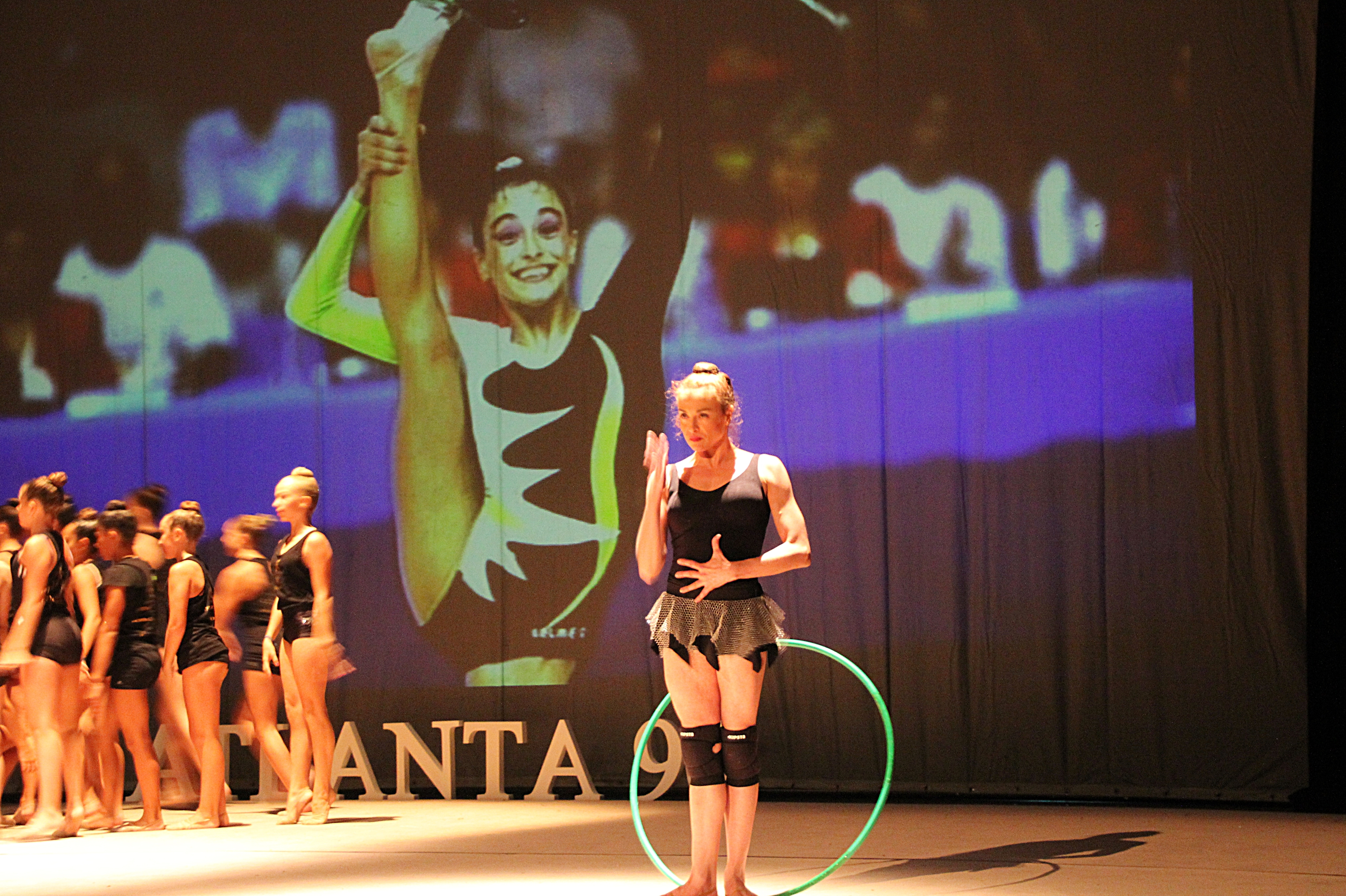 Carolina Pascual en la Gala 20º Aniversario de la Medalla de Oro de Atlanta '96 en Badajoz (2016).